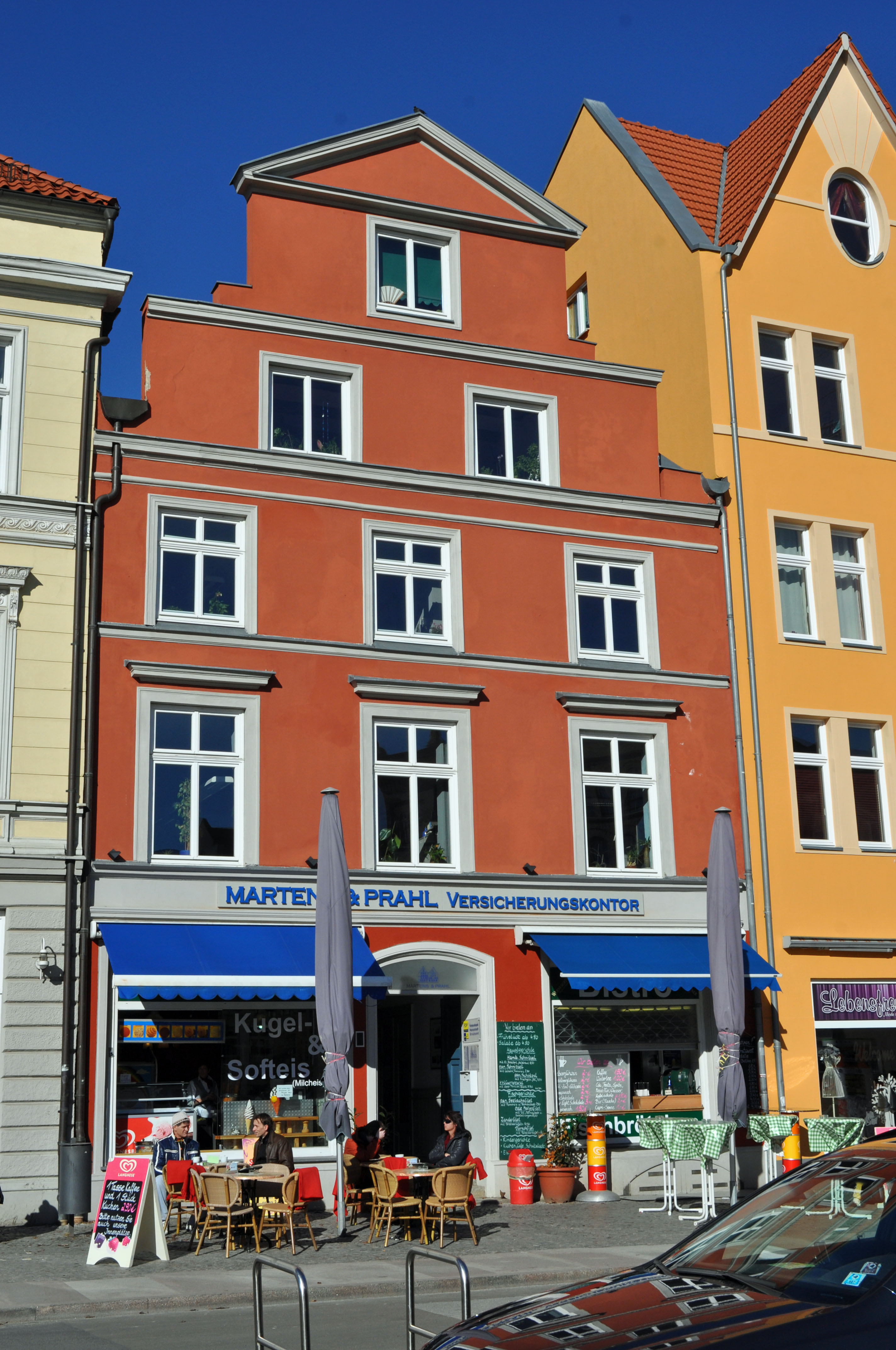 Gebäude bzw. Gebäudedetail in Stralsund. Straße und Hausnummer siehe Dateiname. Das Gebäude ist als Baudenkmal ausgewiesen, siehe dazu die Liste der Baudenkmale in Stralsund.